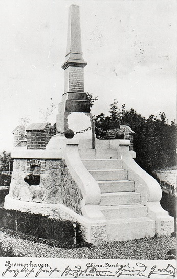 Postkarte mit Originalobelisk zur Erinnerung an die Bremerhavener Gefallenen des Ostasiatischen Expeditionskorps